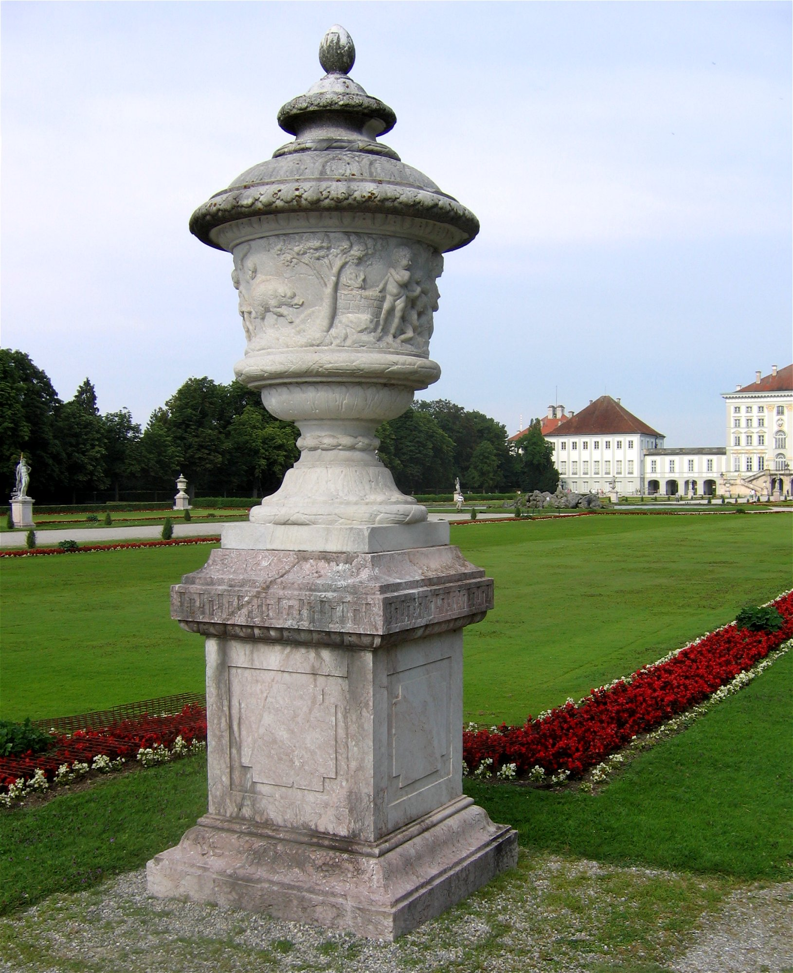 Ziervase von Roman Anton Boos im Schlosspark Nymphenburg, Muenchen